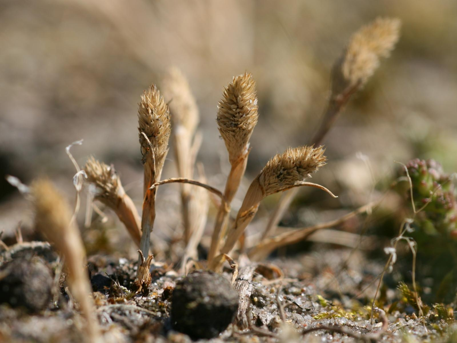 Sand-Lieschgras (Phleum arenarium), Miniform